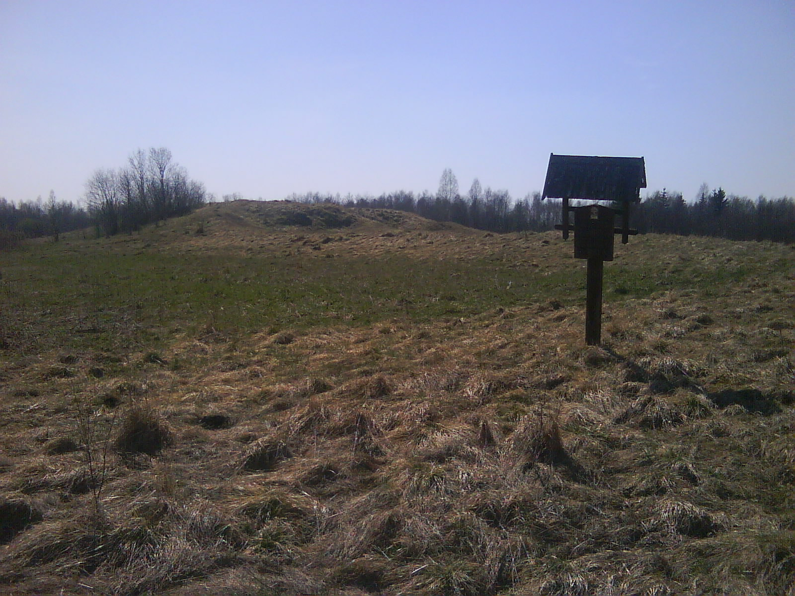 Duonkalnis